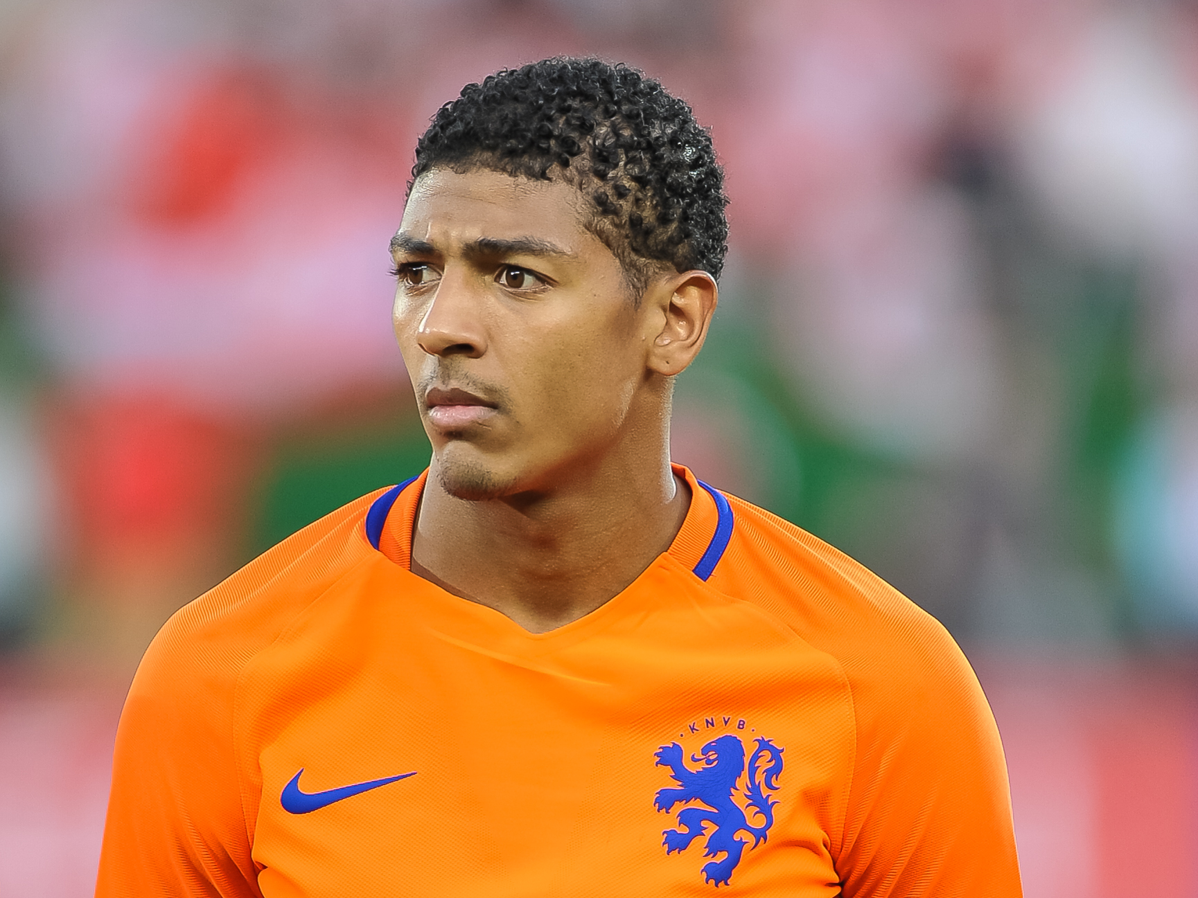 Wien, 4.6.2016, ÖFB Laenderspiel - Österreich vs Niederlande. Bild zeigt Patrick van Aanholt (NED).